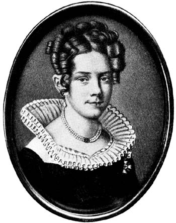 Wilhelmine von Griesheim (1786-1861)